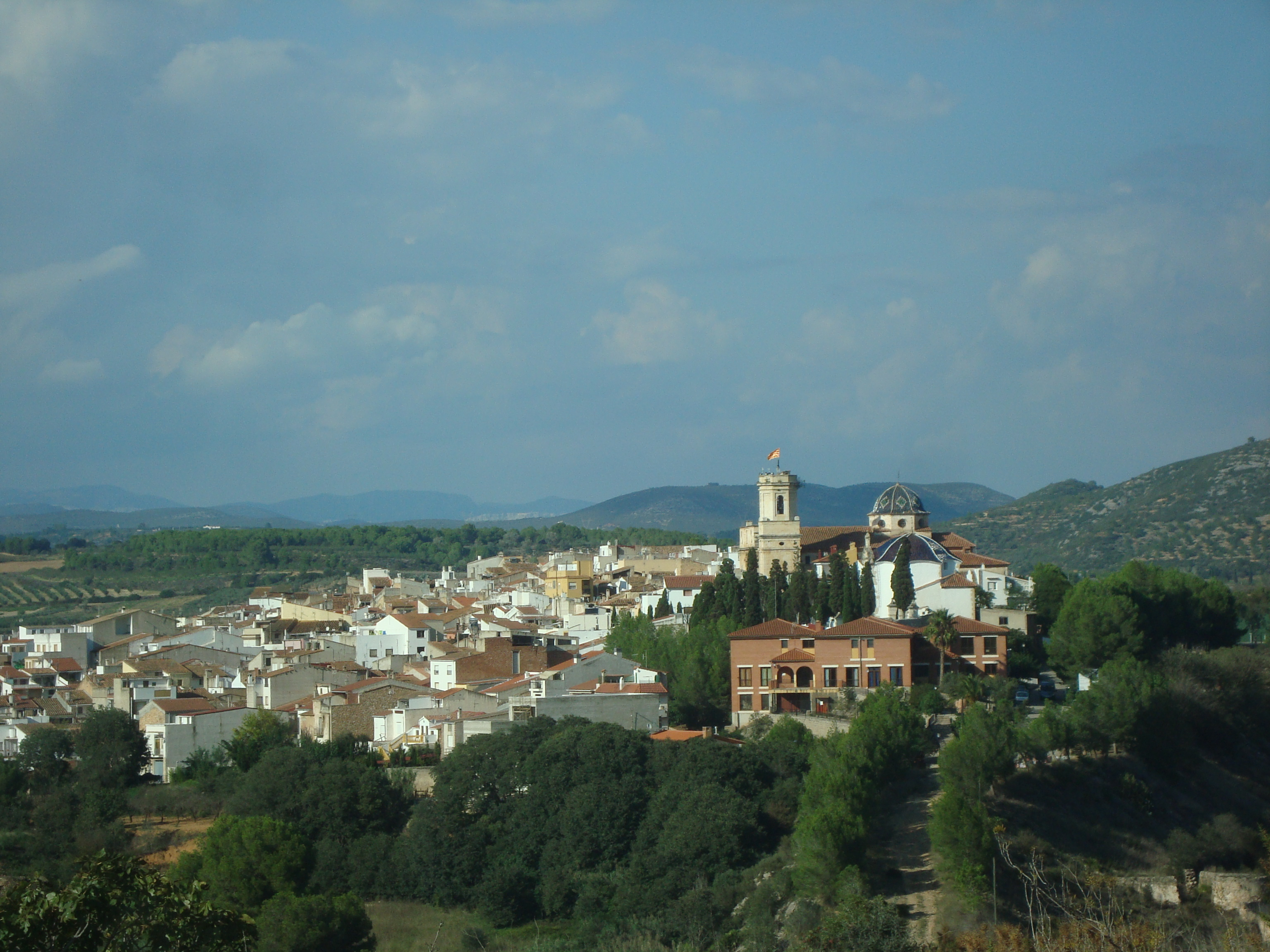 Cuevas de Vinromà (Castellón, Comunidad Valenciana)